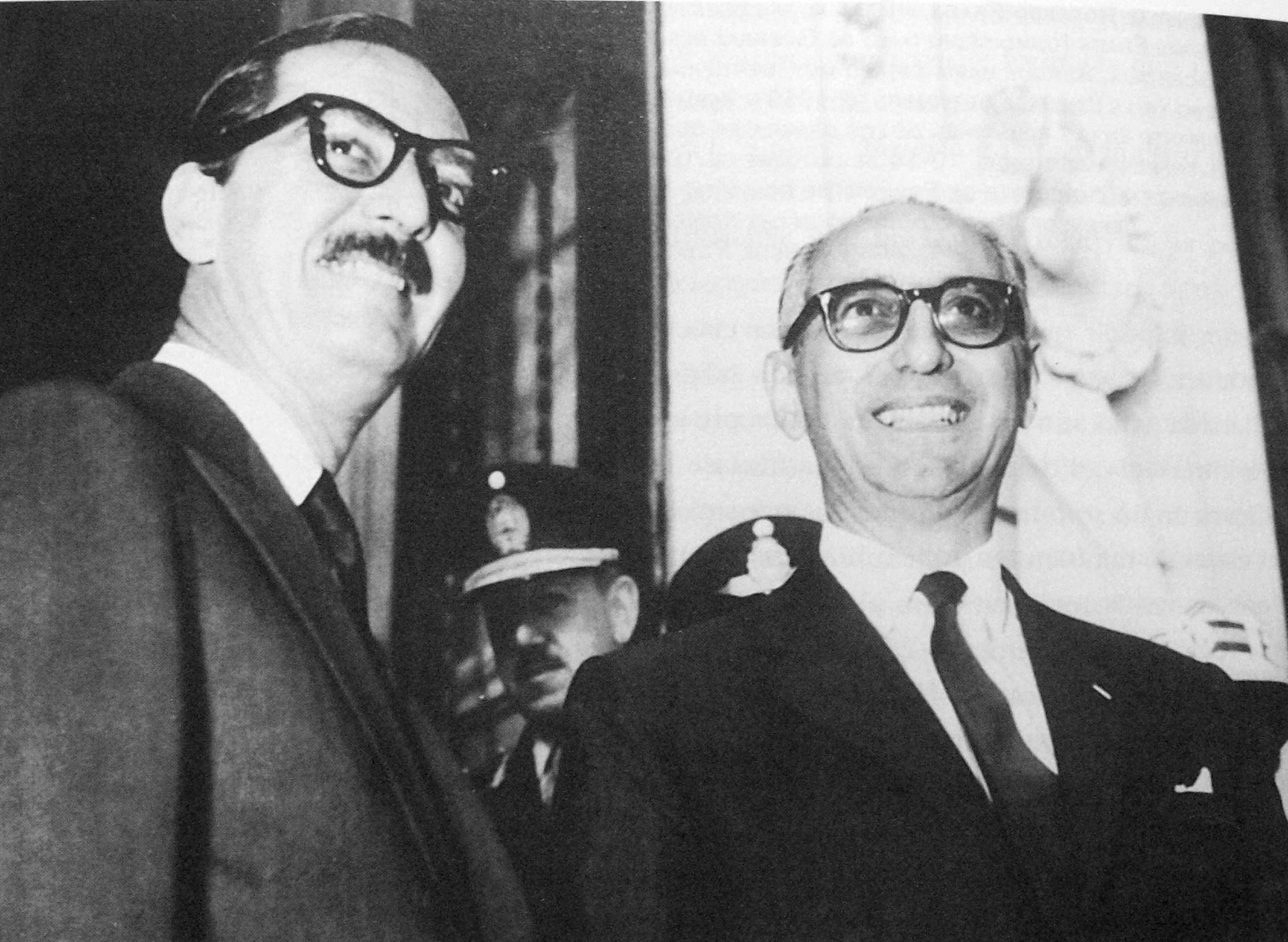 Es una foto de el presidente de Brazil Janio Quadros (izq) junto al presidente de Argentina Arturo Frondizi (der).